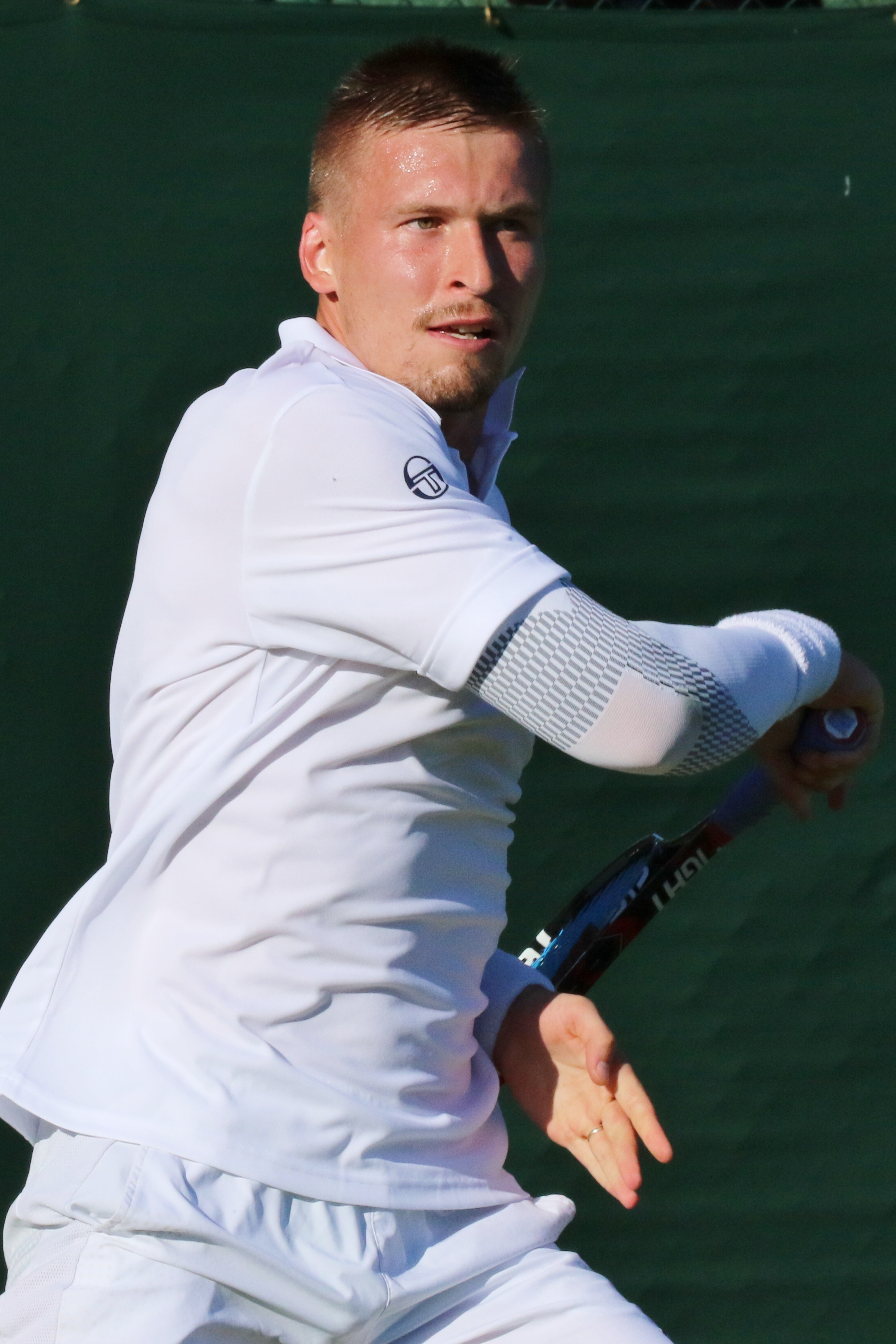 Sidorenko WMQ16 (26)